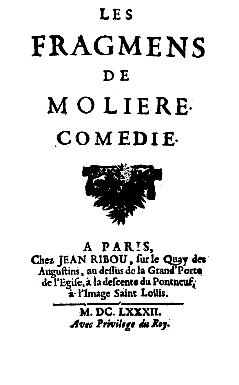 Page de titre des Fragmens de Molière, Ribou, 1682